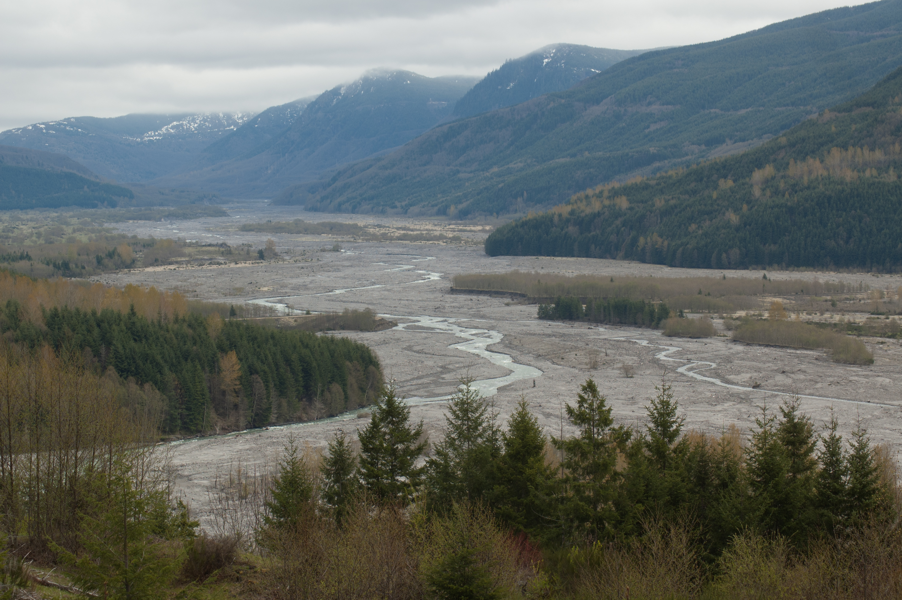 Ike Kinswa State Park and Mt. St. Helens Park